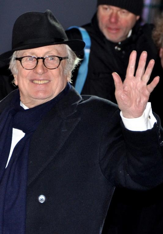 Claude Rich à la cérémonie des César